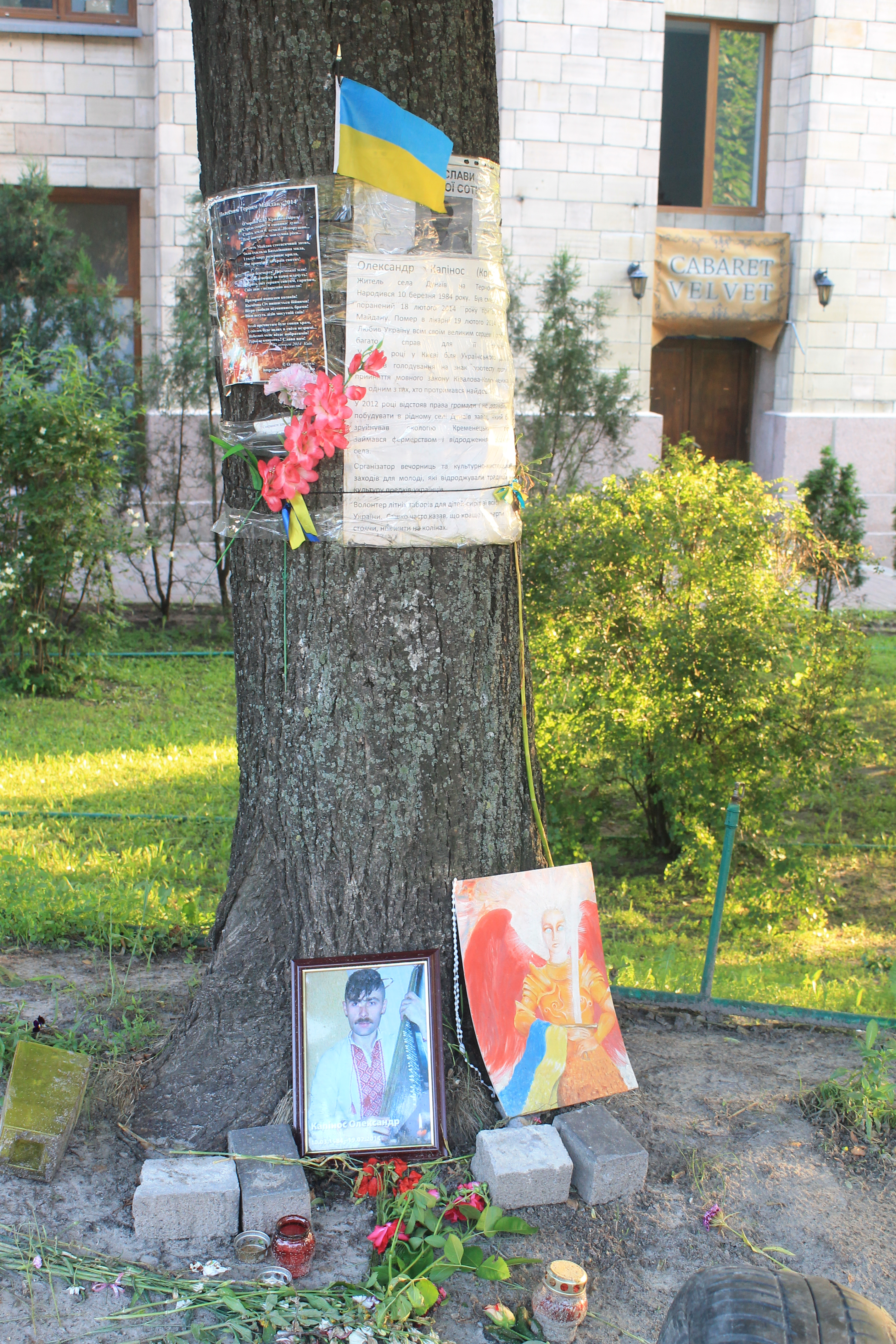 Київ, Алея Небесної сотні, пам'ятний знак на місці загибелі Олександра Капіноса, героя Євромайдану